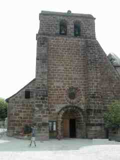 Photo de l'église de Vars-sur-Roseix (Corrèze)